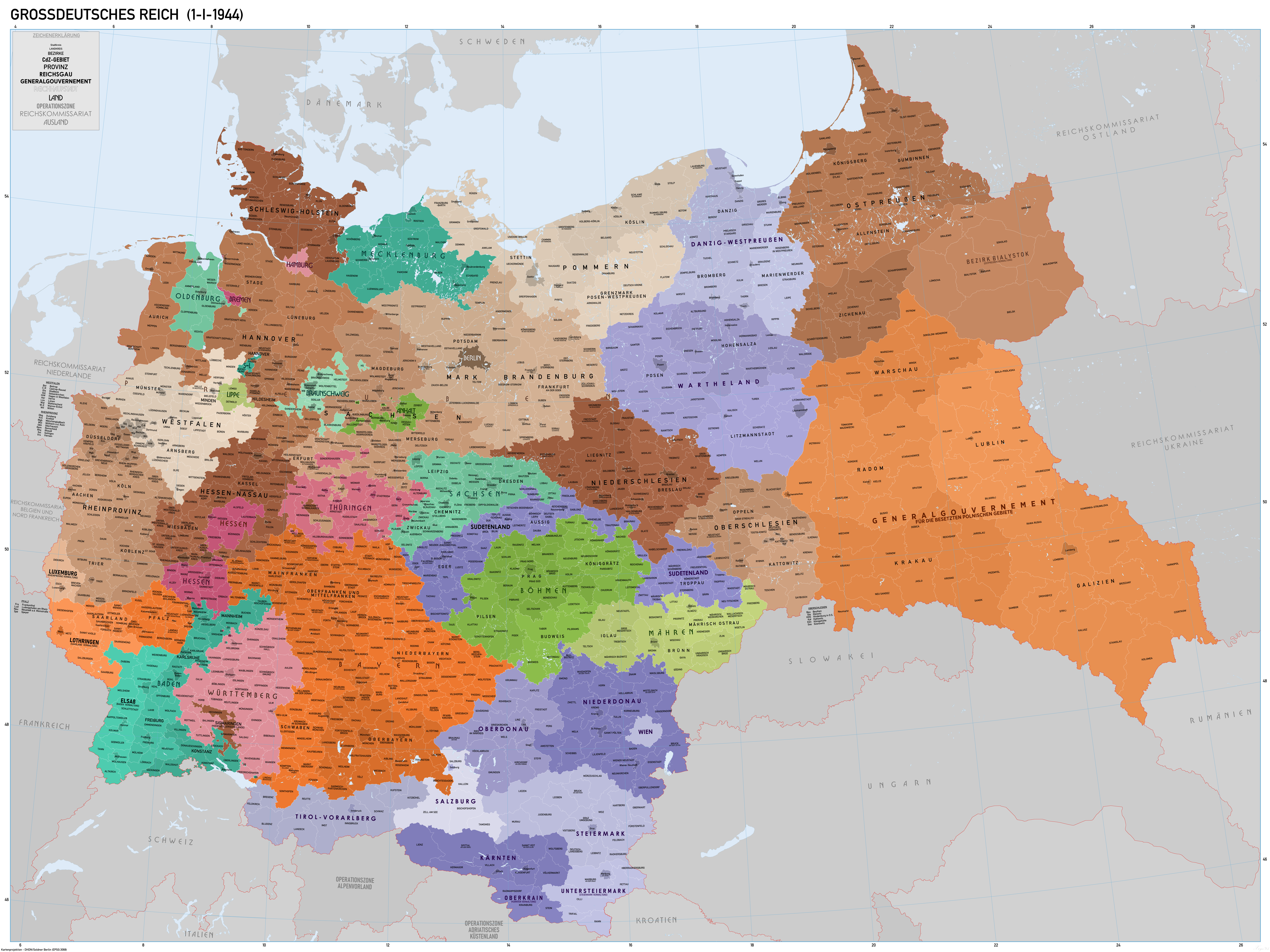 Verwaltungskarte des Grossdeutschen Reiches, im 1-1-1944. Quelle GIS Data digitisierte aus Karte des Deutschen Reiches 1:100 000 und Karte von Mitteleuropa 1:300k. Etwa Karte Quellen bei WIG ( Verwaltungsdatei bei